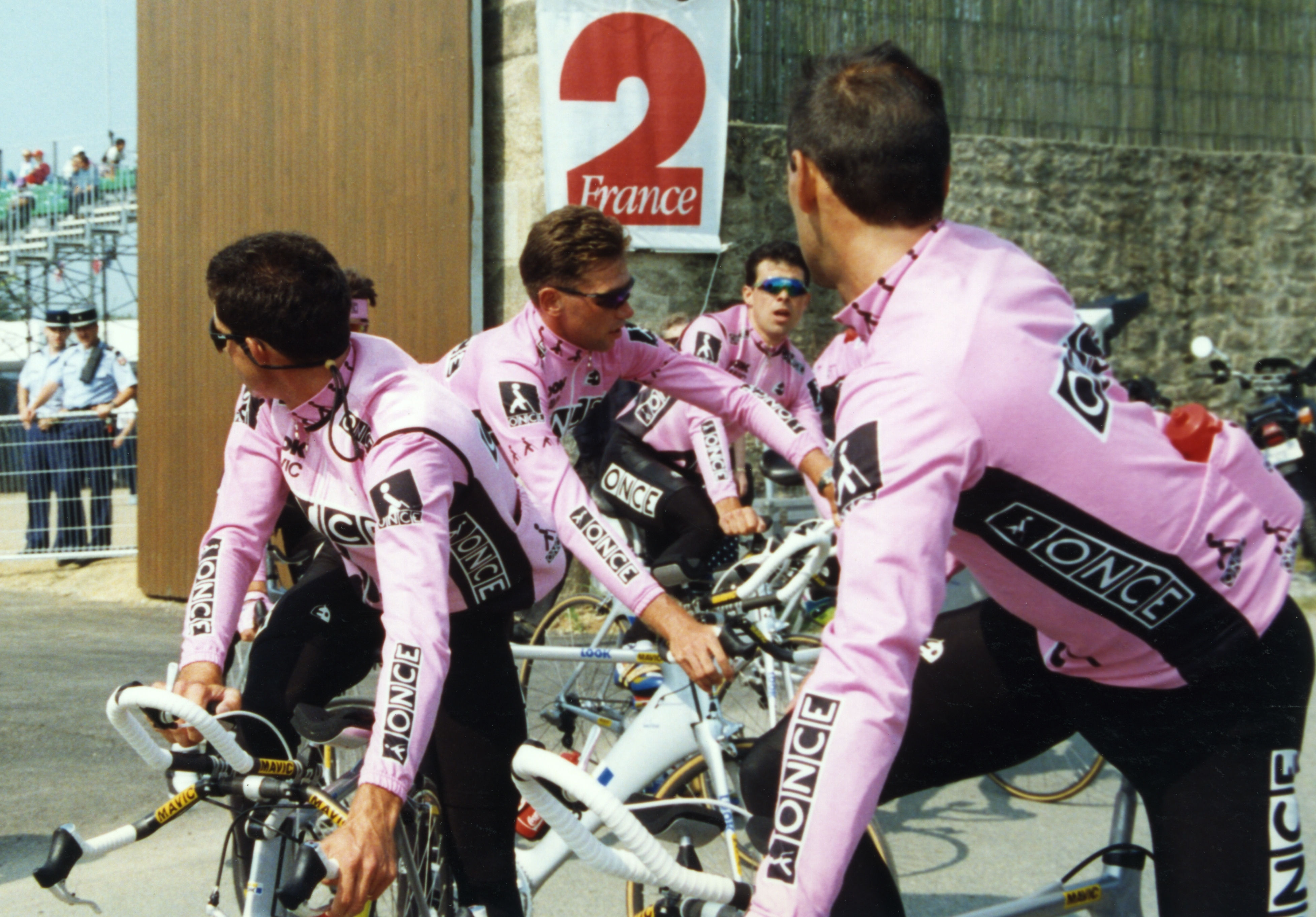 Prologue du TDF 1993 au Puy du Fou